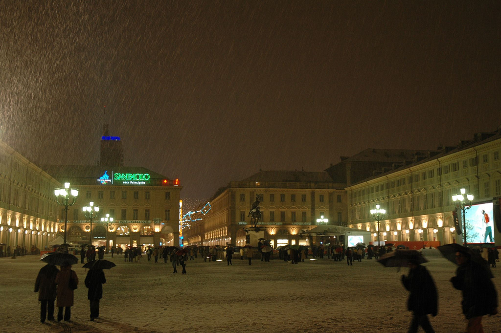 Torino,Italia